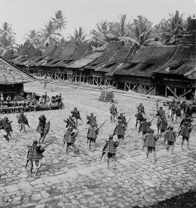 Repronegatief. Een groep Nias krijgers voert een spiegelgevecht uit